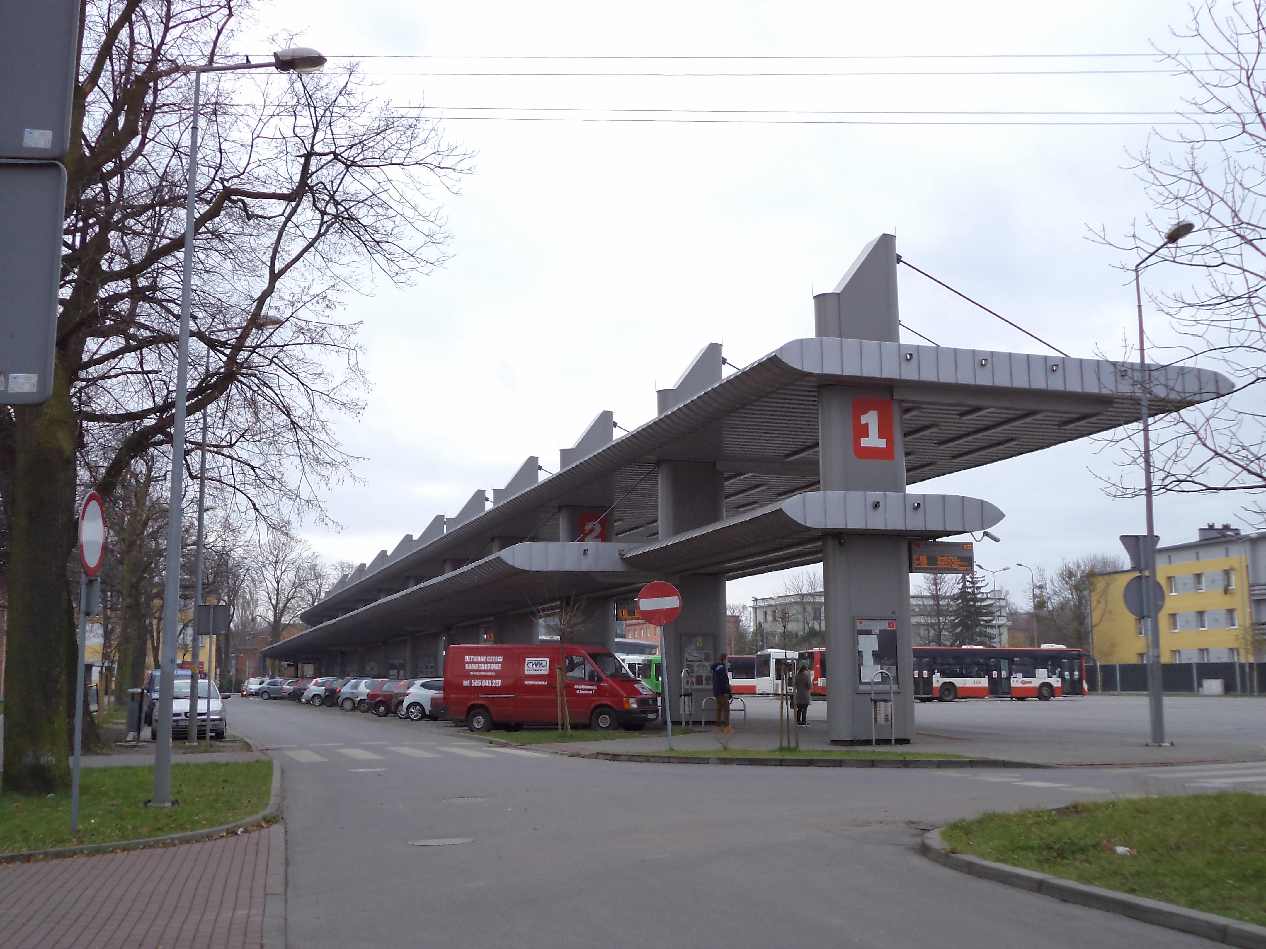 Widok początkowego odcinka ulicy Częstochowskiej w Tarnowskich Górach z dworcem autobusowym ("Przystanek Europa") po prawej stronie